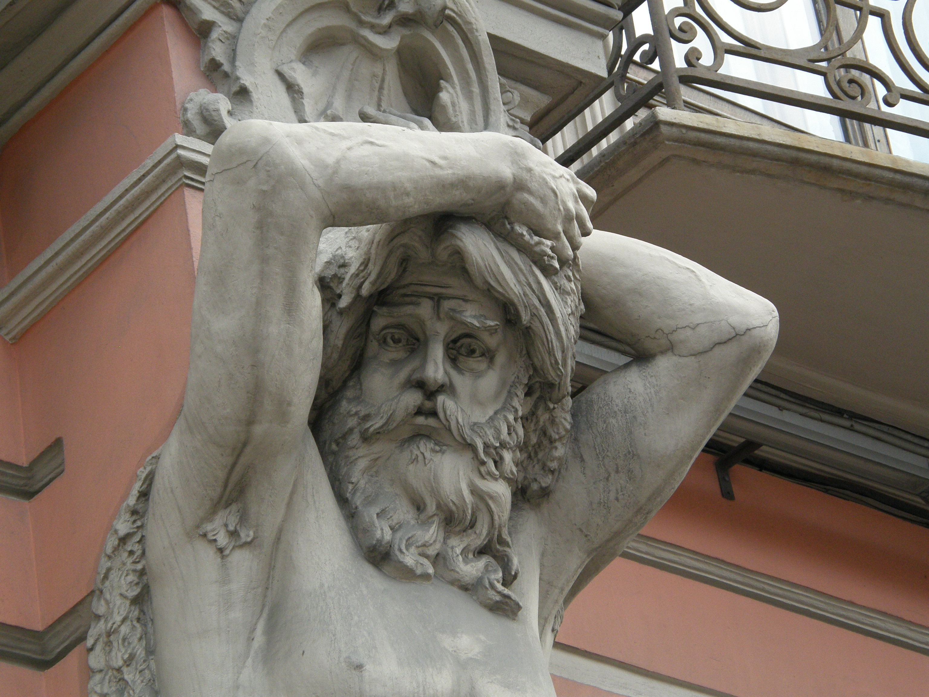 Титаны держат землю на каменных плечах